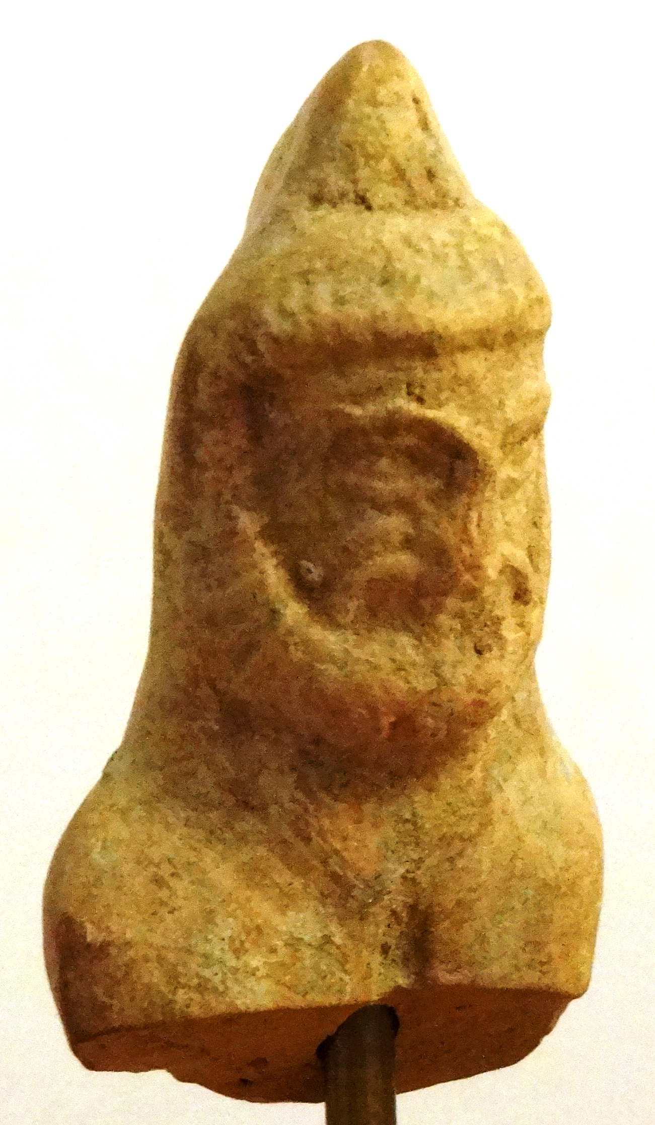 antikes Tonköpfchen eines persischen Reitersoldaten,ca. 4,7 cm hoch